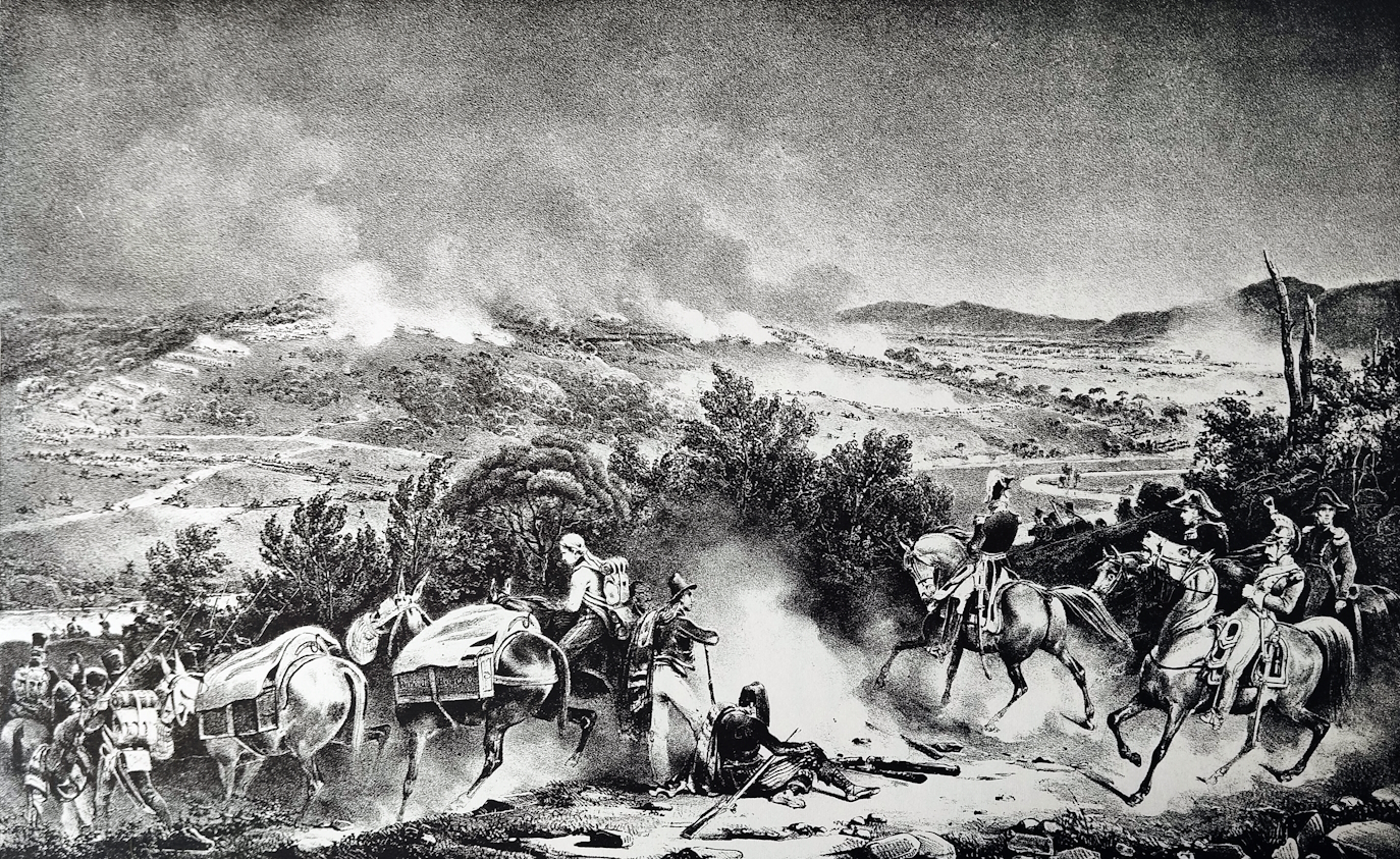 Bataille de Cardedeu, 16 décembre 1808. Au cours de l'affrontement, les troupes franco-italiennes de Gouvion-Saint-Cyr enfoncent l'armée espagnole des généraux Vives et Reding.